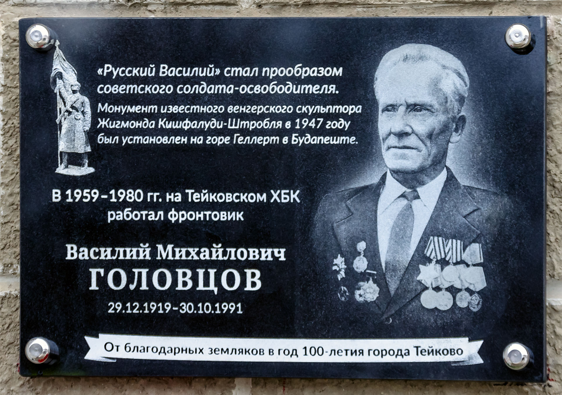 Мемориальная доска В.М.Головцову на Тейковском ХБК